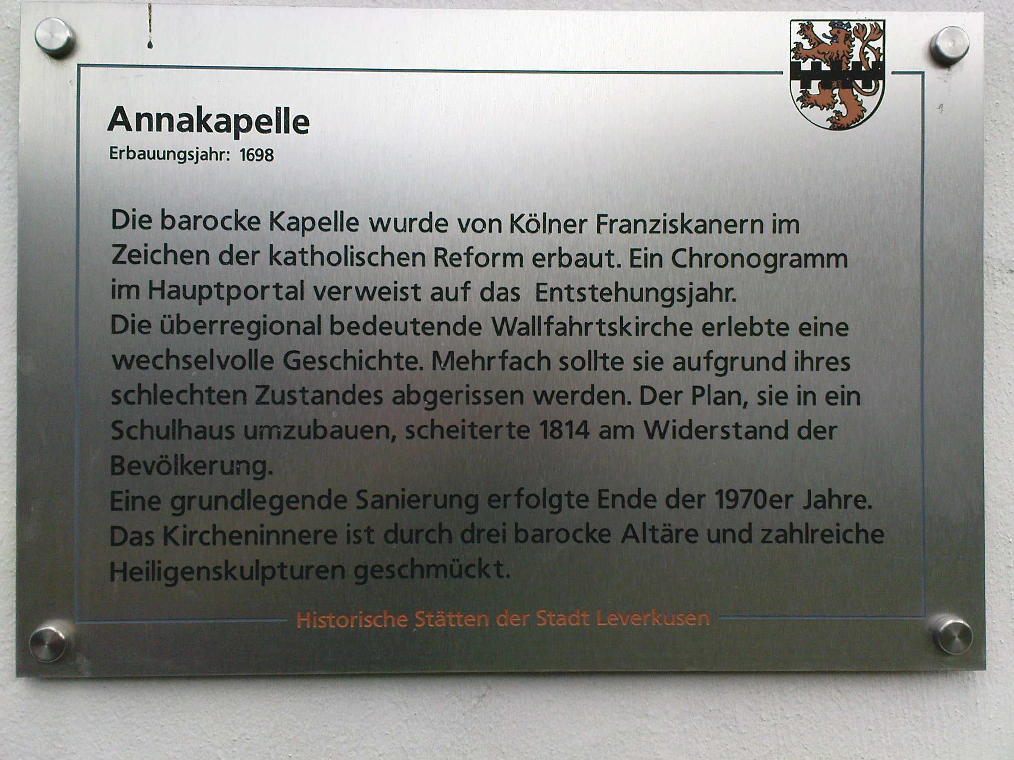 Tafel an der Annakapelle in Leverkusen-Lützenkirchen